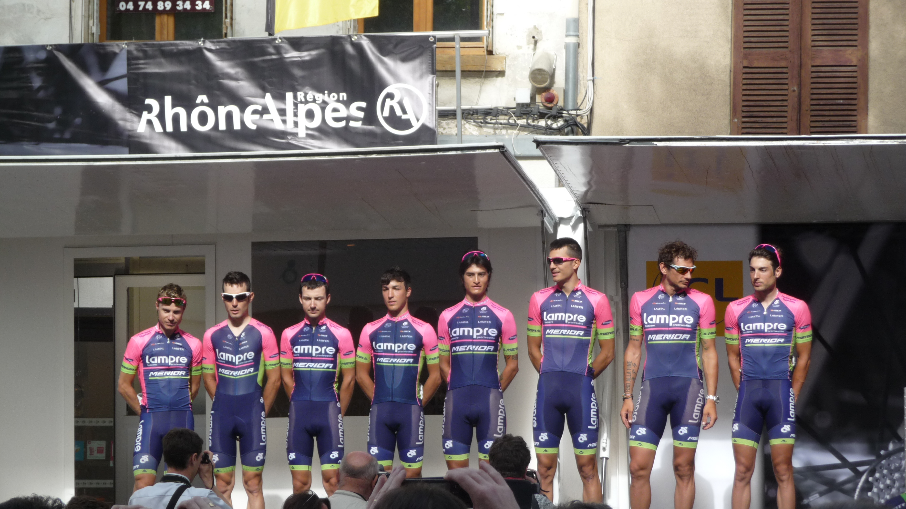 Présentation des équipes du Critérium du Dauphiné 2014 lors du départ de la 2ème étape à Tarare.